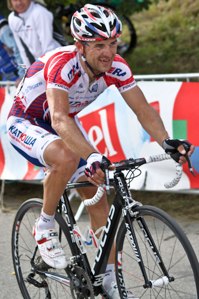 Le coureur russe Vladimir Gusev lors de la 19e étape du Tour de France 2011.